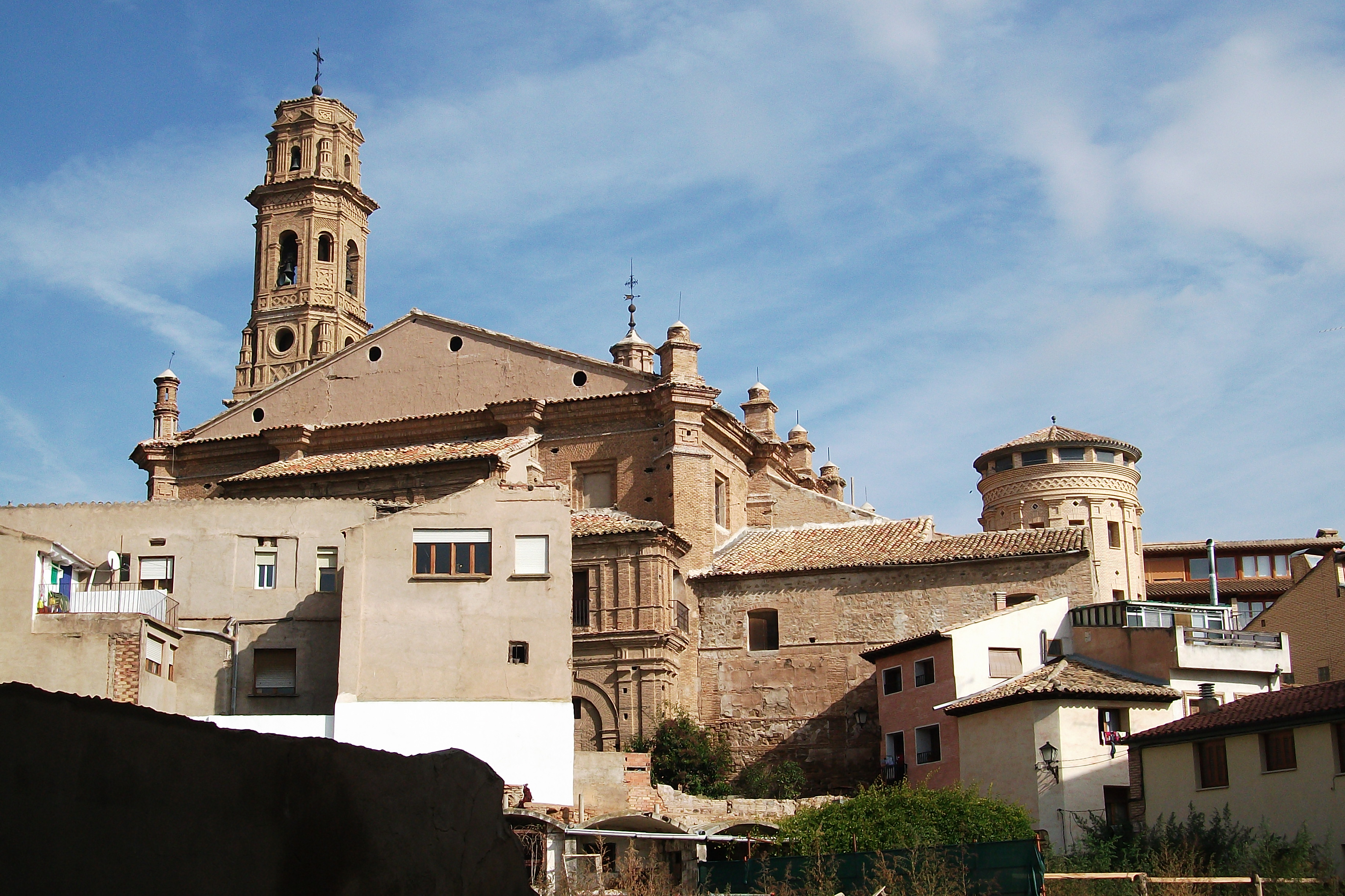 Corella. Imagen del pueblo. Noviembre de 2011